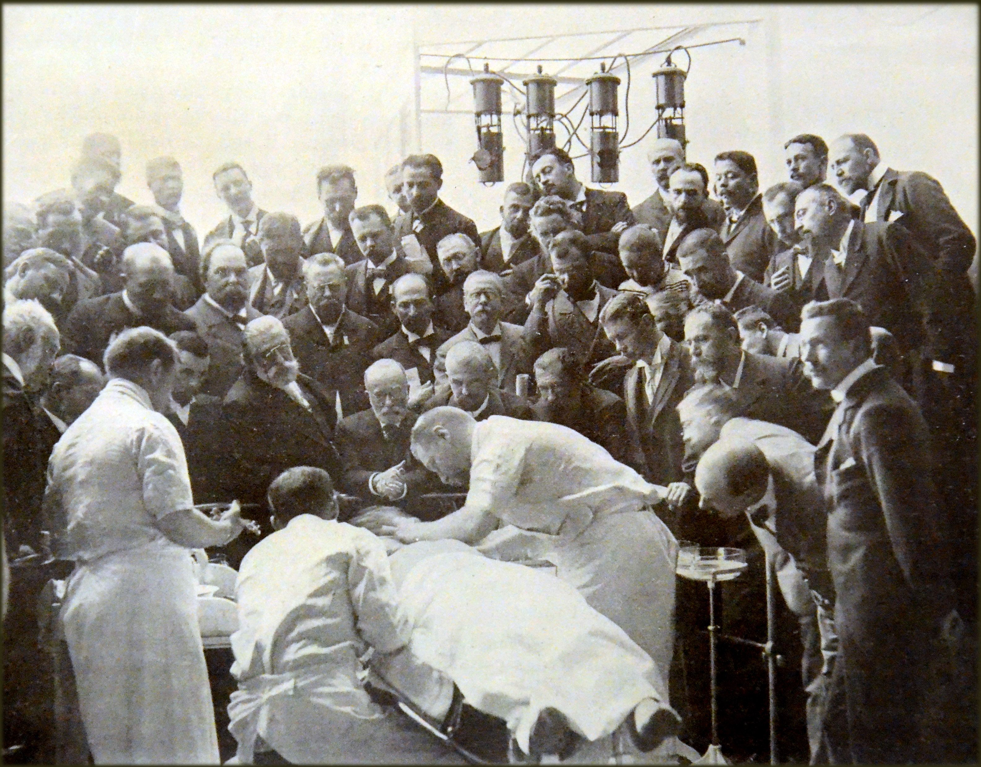 Photo légendée "Une opération de craniectomie en présence des professeurs Von Bergmann, Von Eiselberg, Keen, Levchine, Sneguireff, Glubaroff, etc. (Congrès international de médecine, 5 aout 1900)" , extraite d'un article intitulé "Les progrès récents de la chirurgie", dans la "Revue illustrée" (Tome relié 1902).